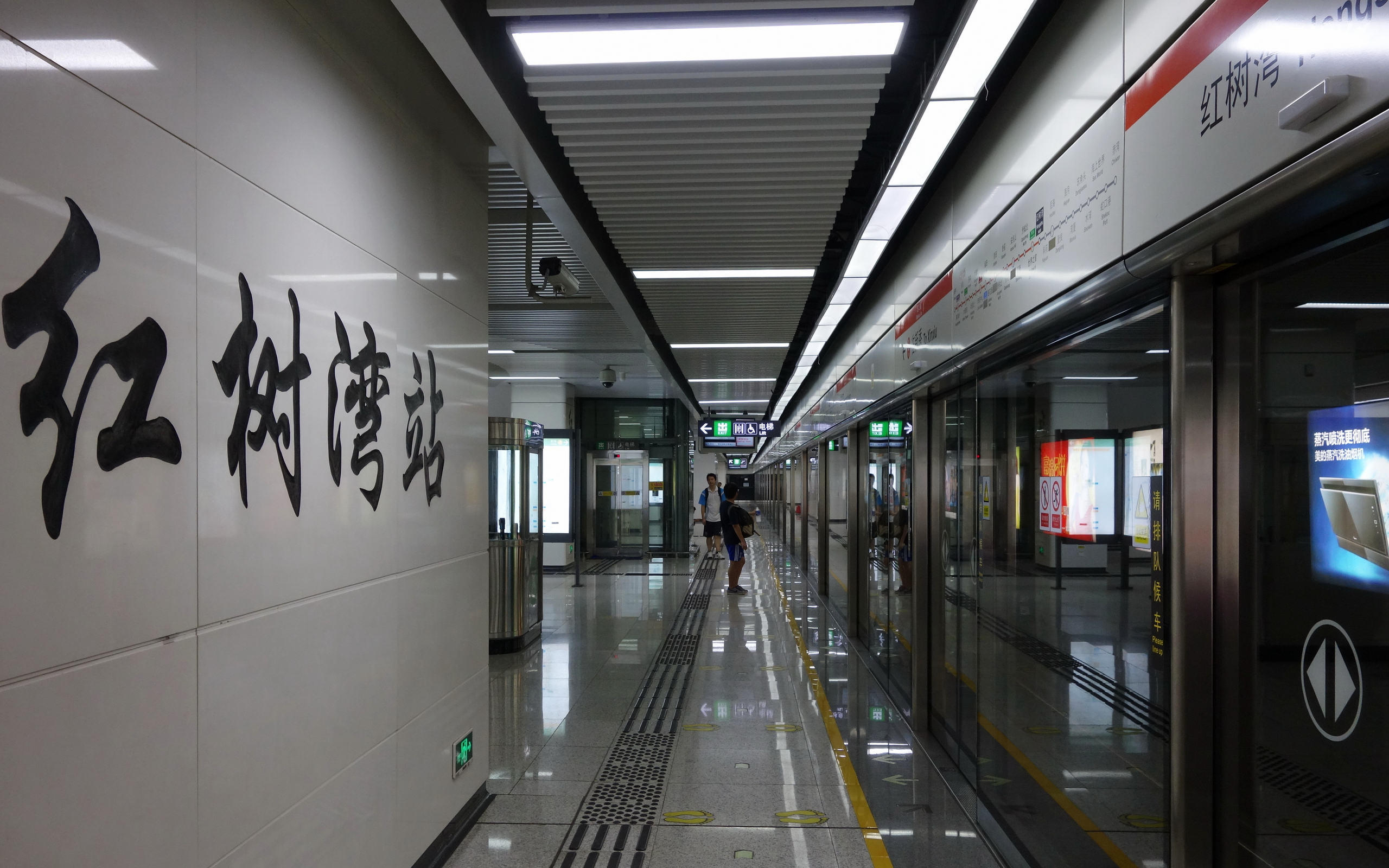 蛇口線红树湾车站站台